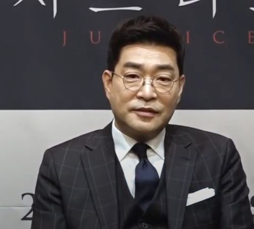 KBS '저스티스' 제작발표회